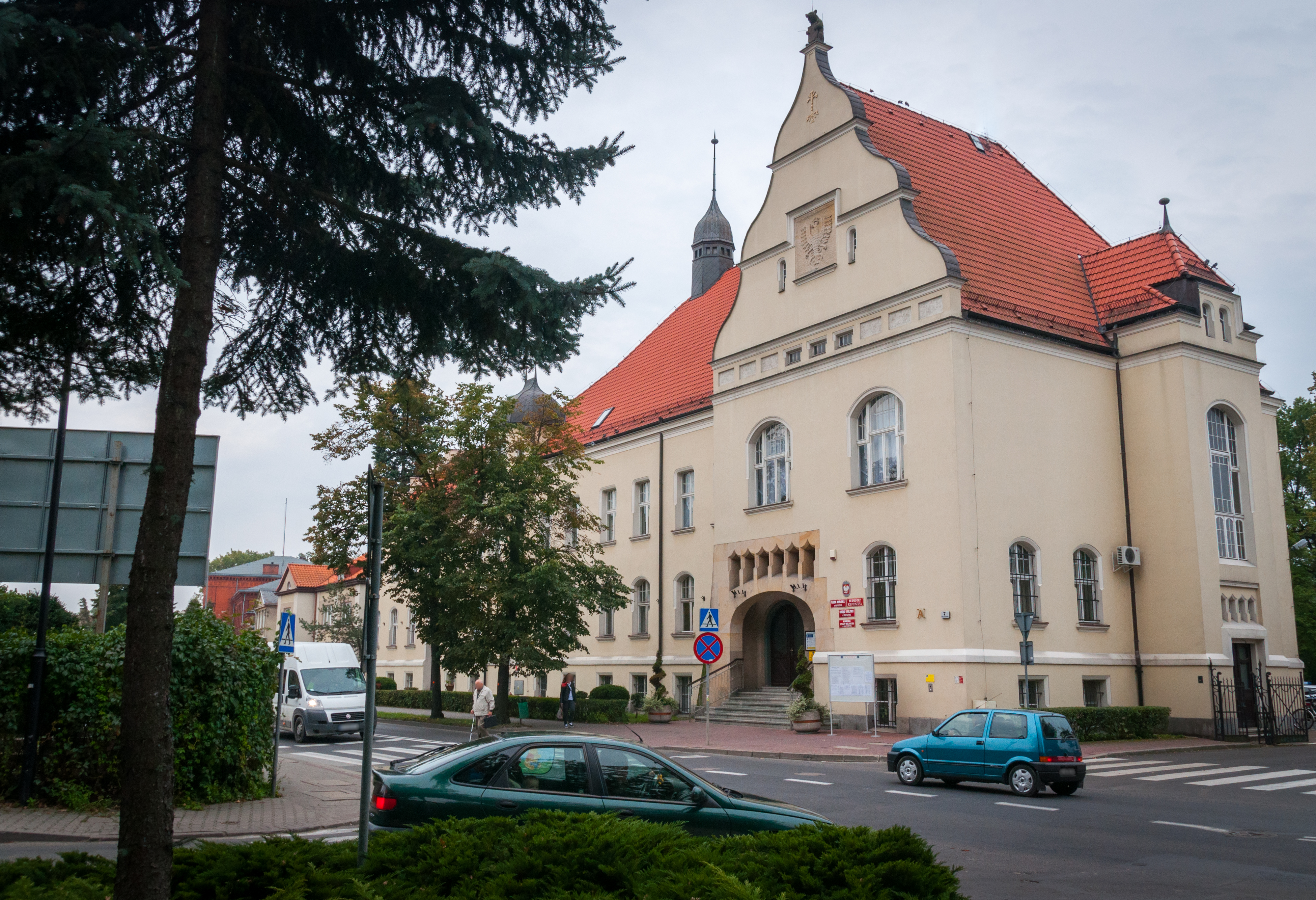 Krotoszyn, starostwo, ob. UMiG, 1900-1901, 1912, 1928